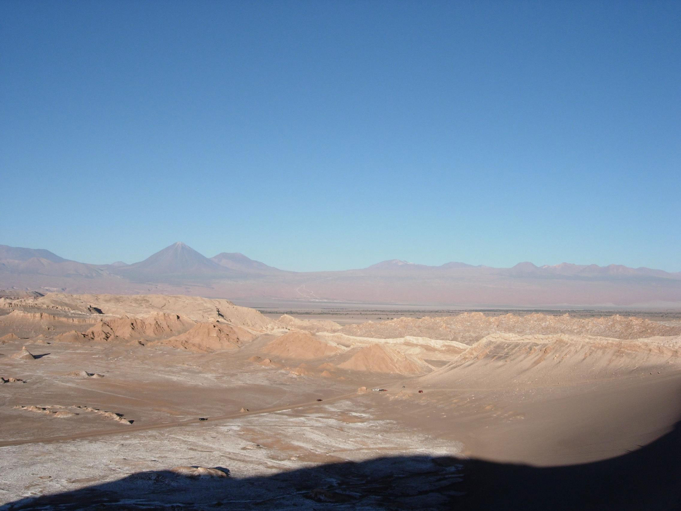 Blick über das Mondtal Valle de la Luna auf die Anden im Hintergrund